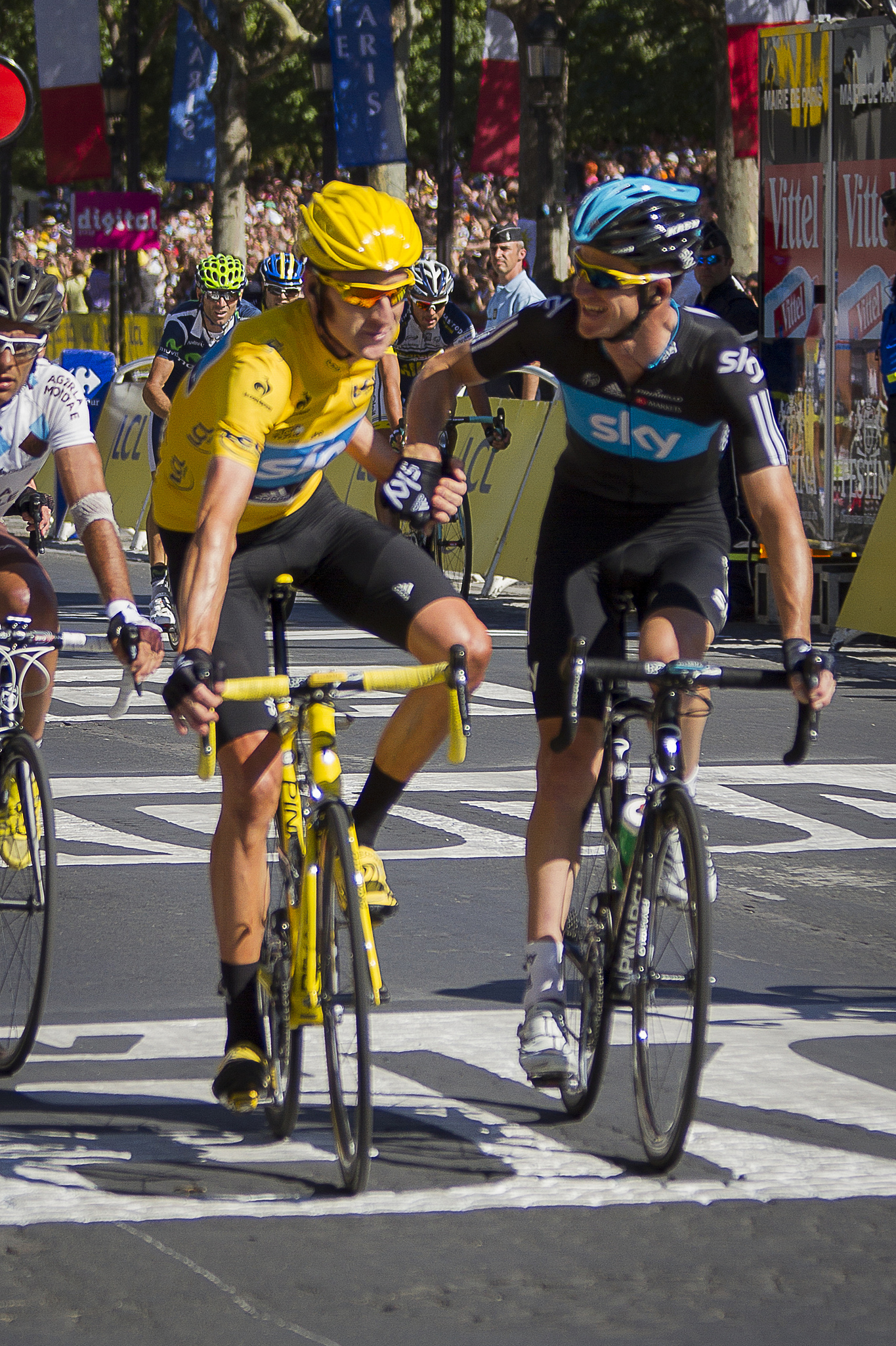 Joie de Bradley WIGGINS (SKY) Vainqueur du tour de France 2012 félicité par un coéquipier de la SKY - 20e étape du Tour de France 2012, arrivée sur les champs Elysées à Paris lors de la dernière étape entre Rambouillet et paris les Champs Elysées le dimanche 22 juillet 2012 - © William Morice / MaxPPP